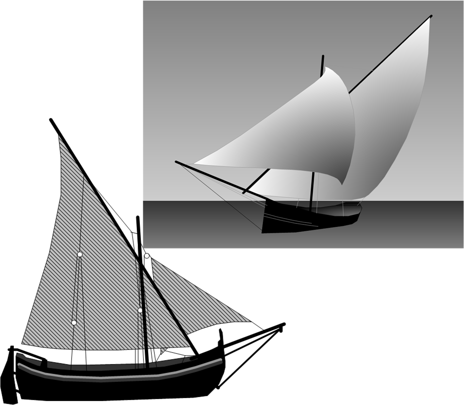 Szkic XVII-wiecznej łodzi typu falkuša z wyspy Vis na Adriatyku.